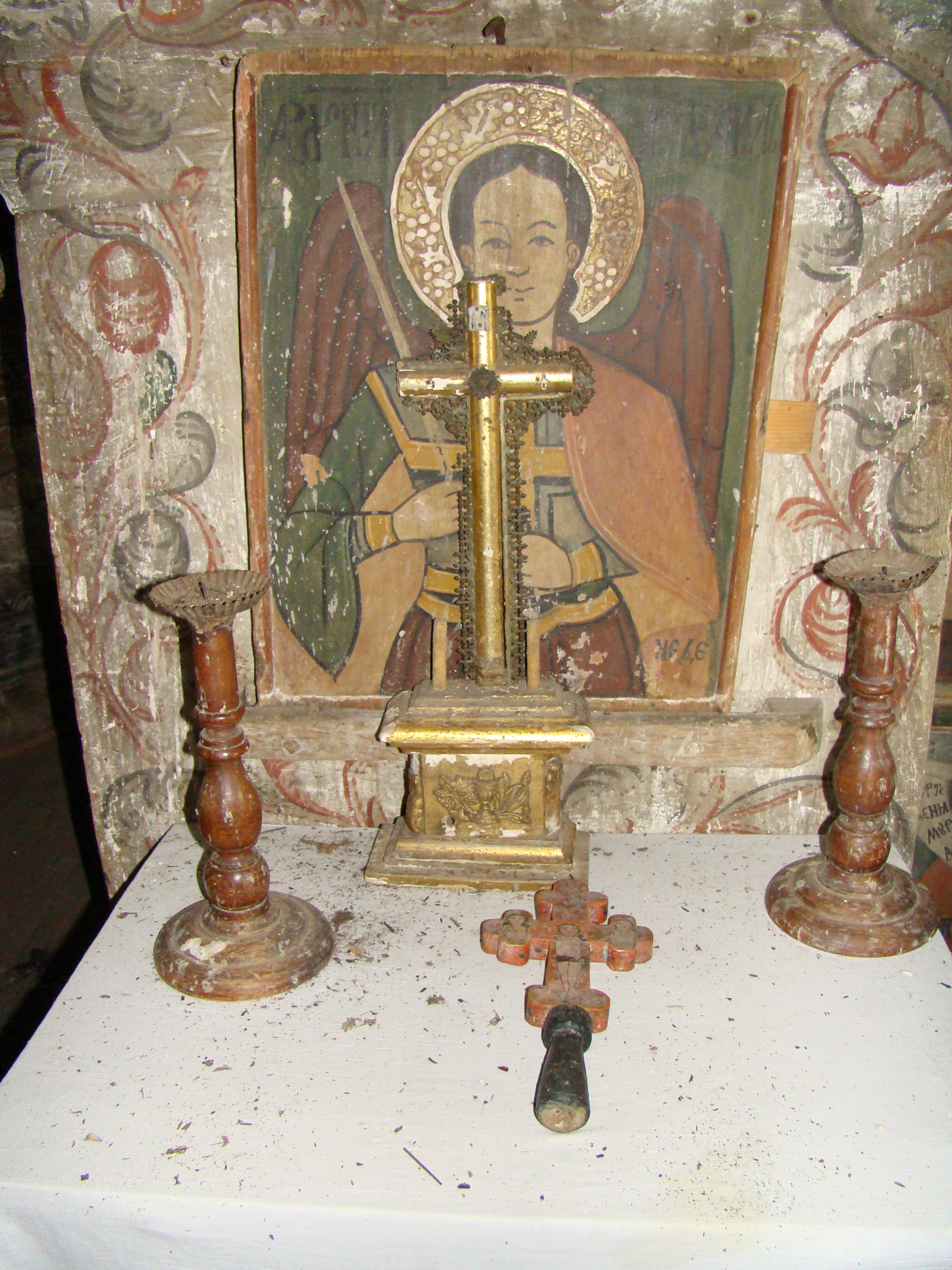 Biserica de lemn „Sf.Arhangheli” , Sălișca Deal, județul Cluj